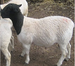 Borrego semental dorper